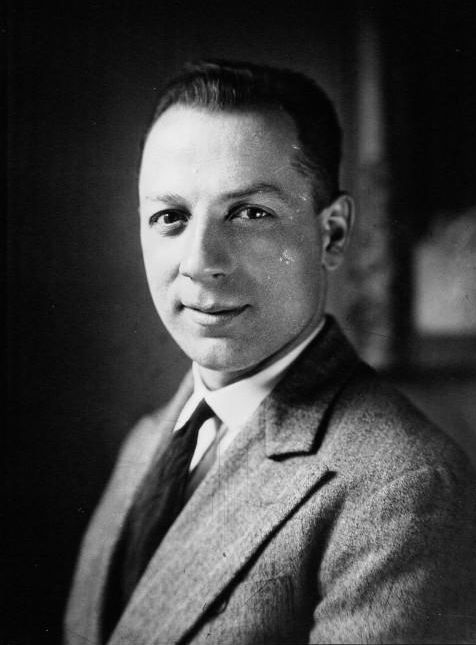 Mr Michard (portrait)